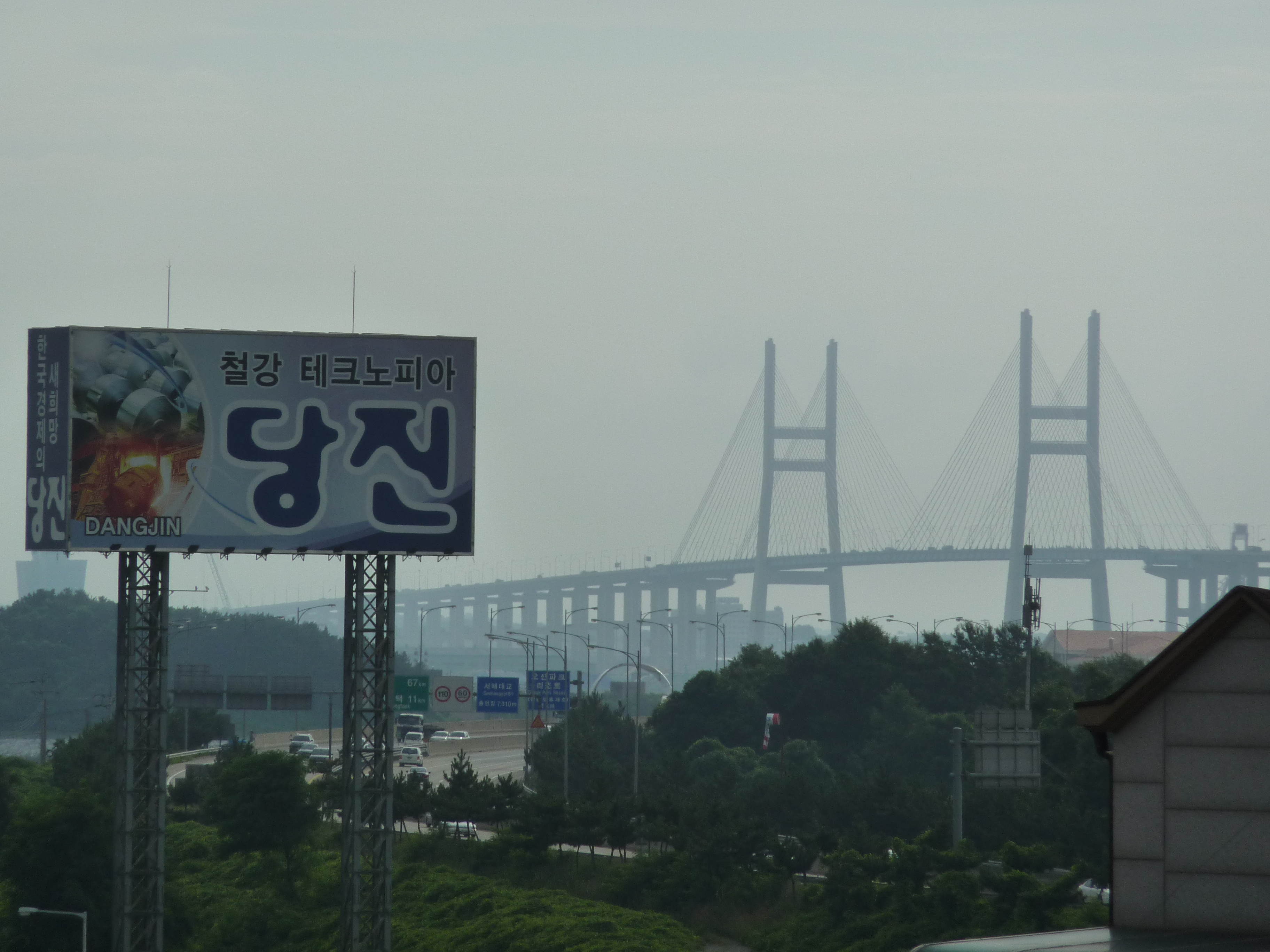 韓国忠清南道唐津市 西海大橋